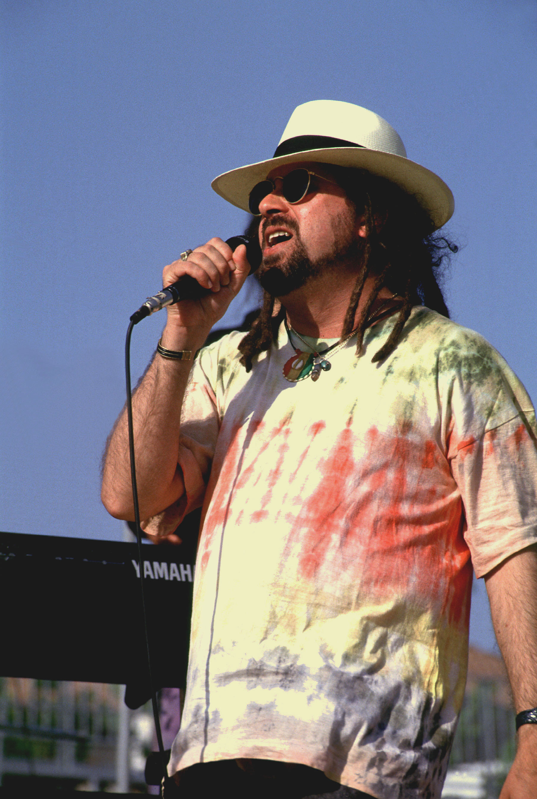 Sir Oliver Skardy del gruppo raggae veneziano Pitura Freska